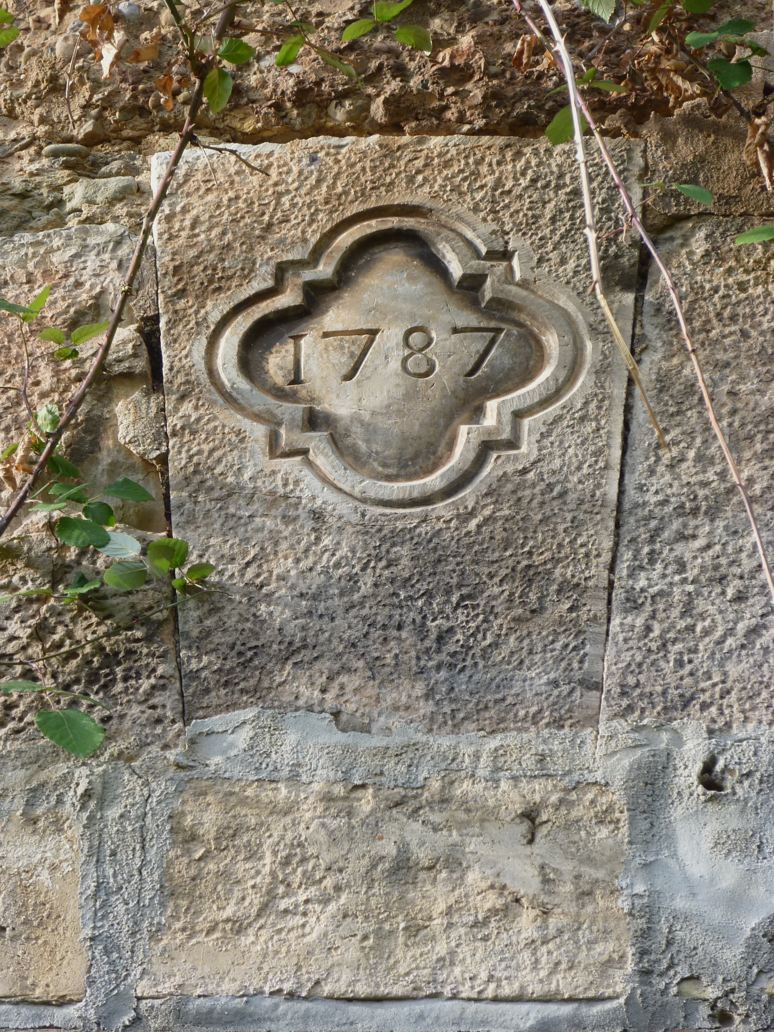 Torre de la Corriu (Guixers): data a la llinda de la porta nord